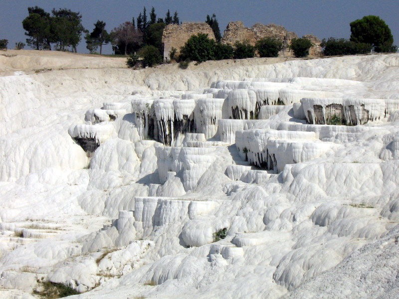 Pamukkale